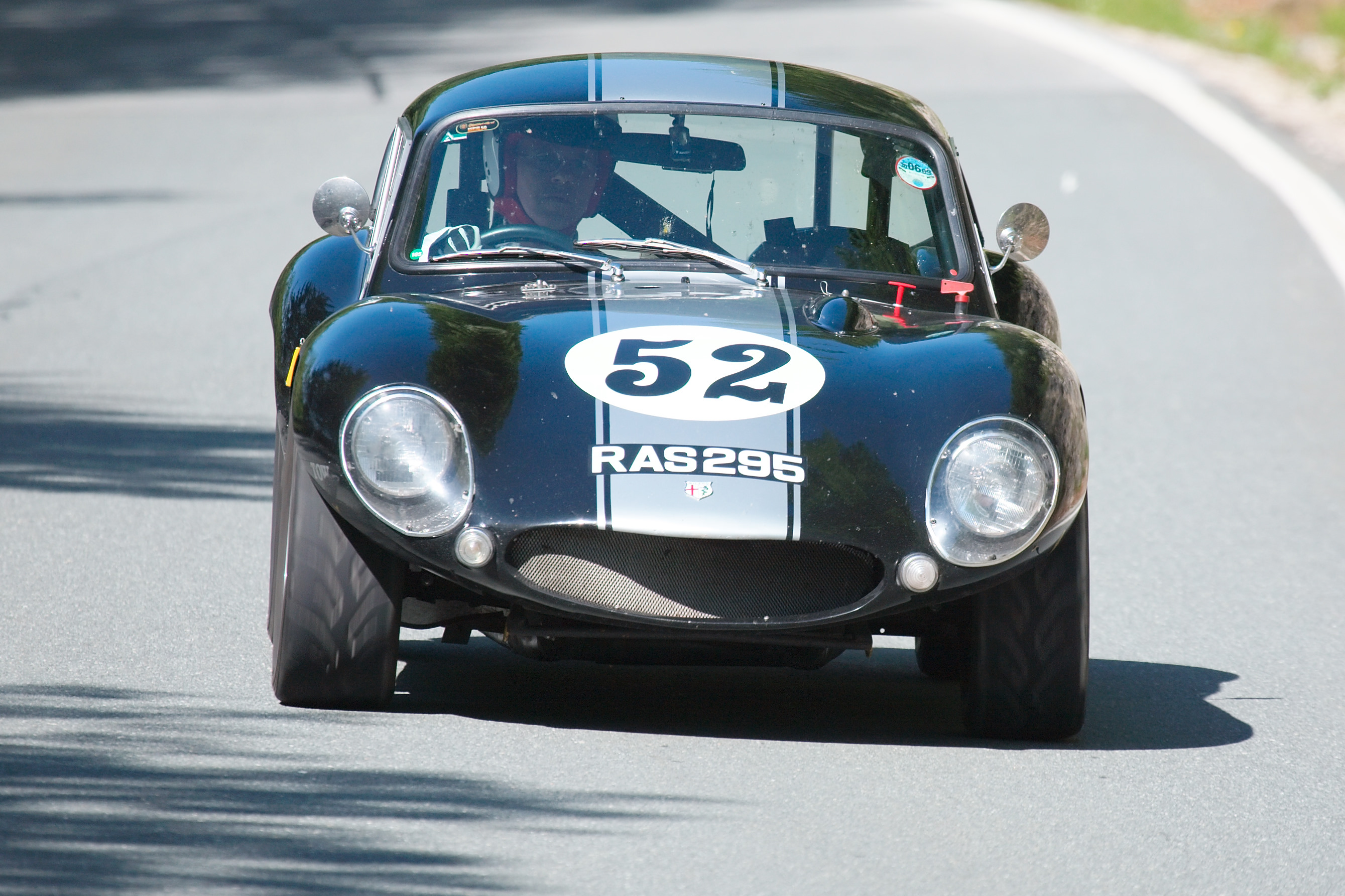 JWF Milano GT at Gaisbergrennen 2009